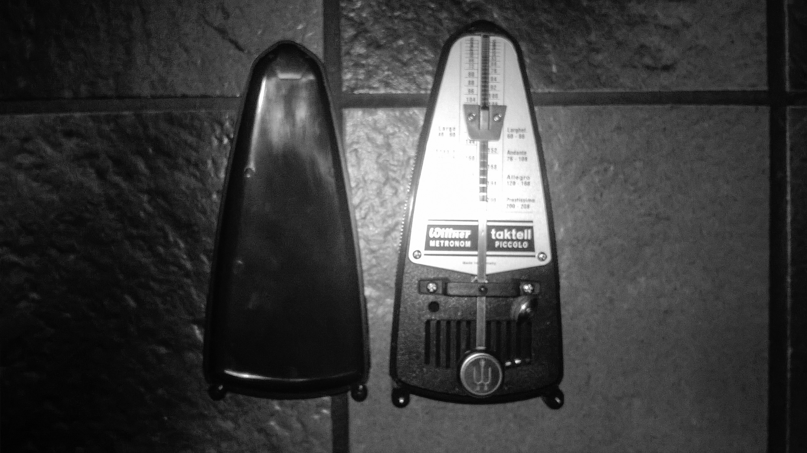 Metronomi